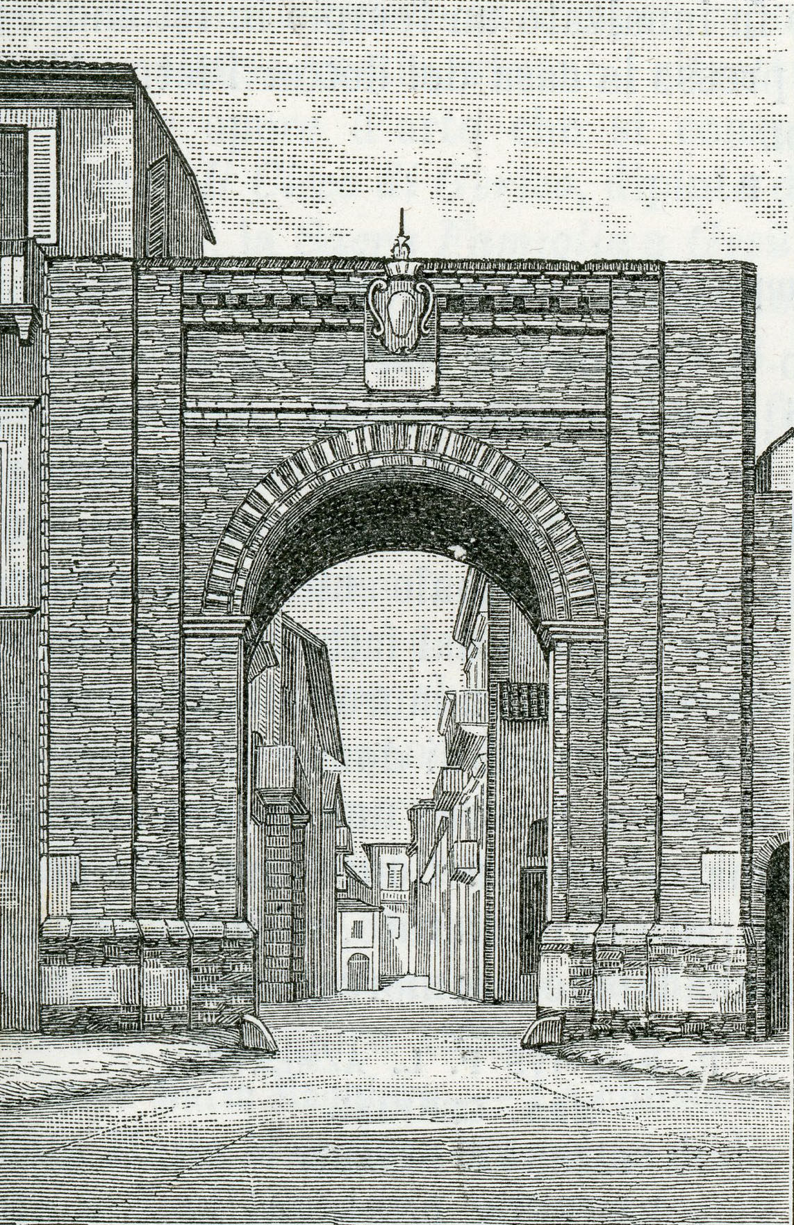 Vasto: porta nuova (incisore anonimo 1898).